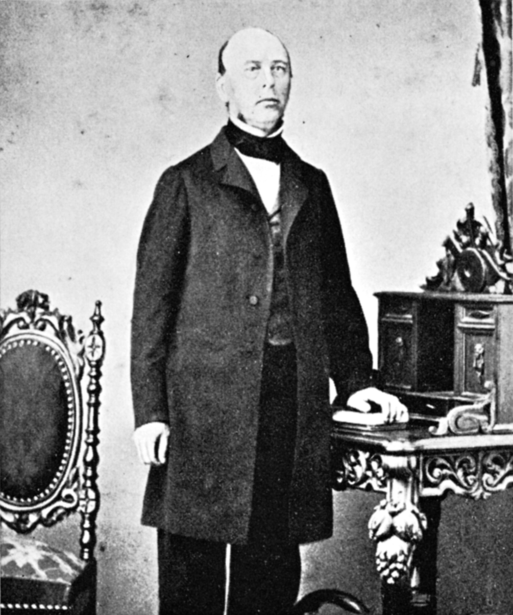 Philipp Anton von Segesser (1817–1888). Führer der Konservativen im schweizerischen Nationalrat